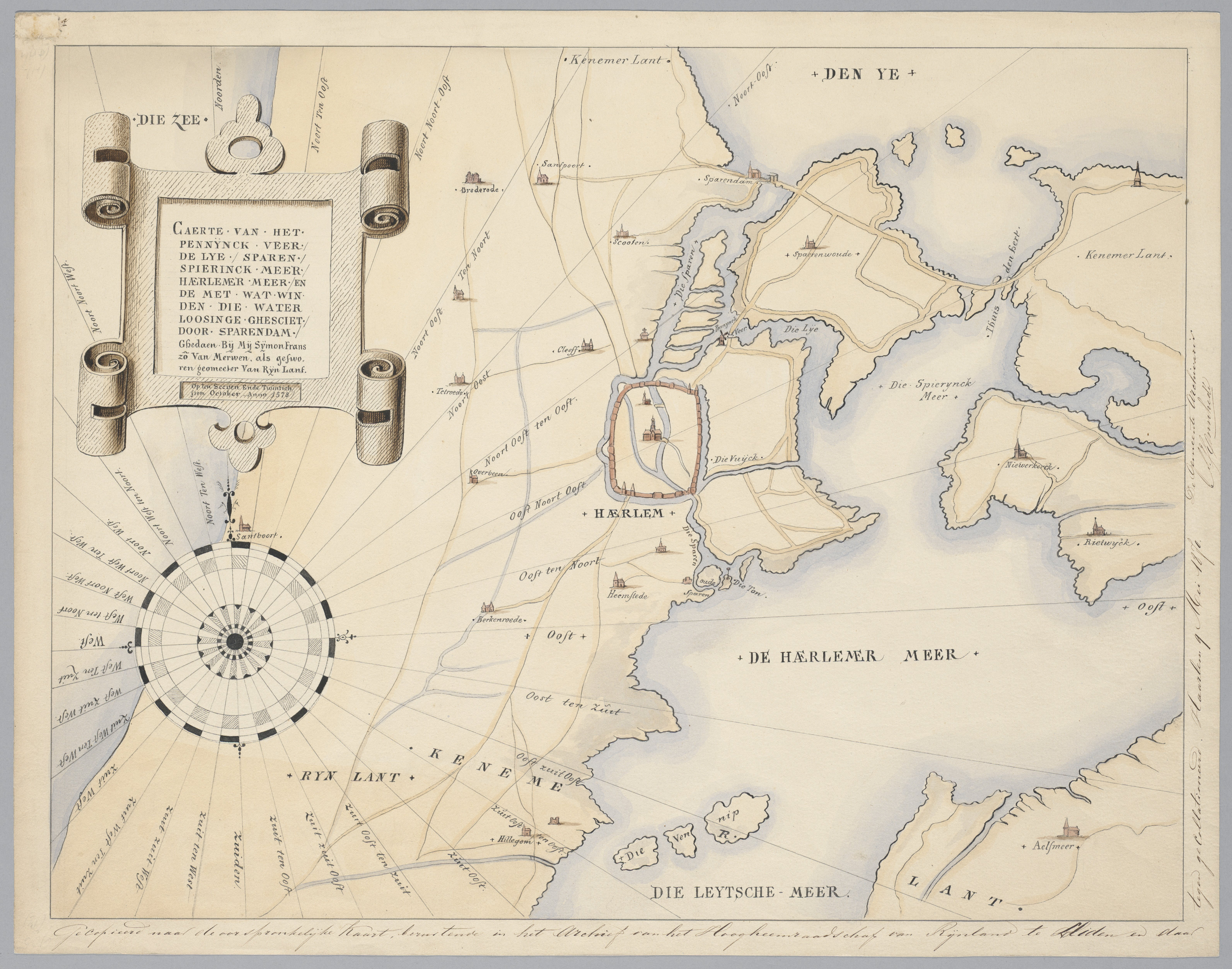 Kaart van de Haarlemmermeer, de Liede, Spieringmeer, het Spaarne, het Leidsemeer en penningsveer